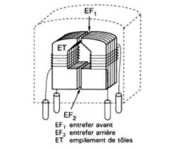 entrefer